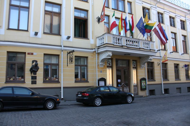 Nukuteater, Tallinn.